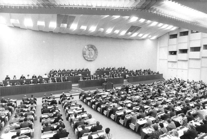 ADN-ZB/Settnik 18.12.87-Berlin: 5. VK-Tagung Die Volkskammer der DDR trat zu ihrer Tagung zusammen. Dem Vorschlag des Präsidiums der Volkskammer entsprechend standen die Entwürfe der Gesetze über den Volkswirtschaftsplan 1988 und über den Staatshaushaltsplan 1988 auf der Tagesordnung.